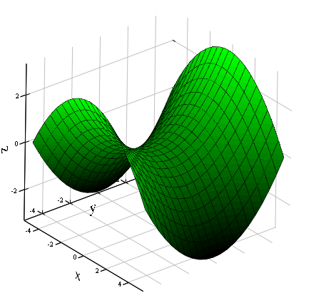 Hyperbolic paraboloid